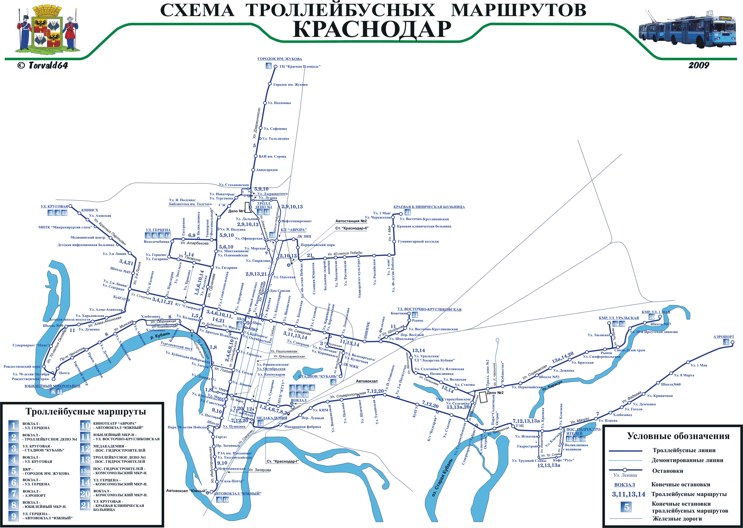 Троллейбусные маршруты города Краснодара